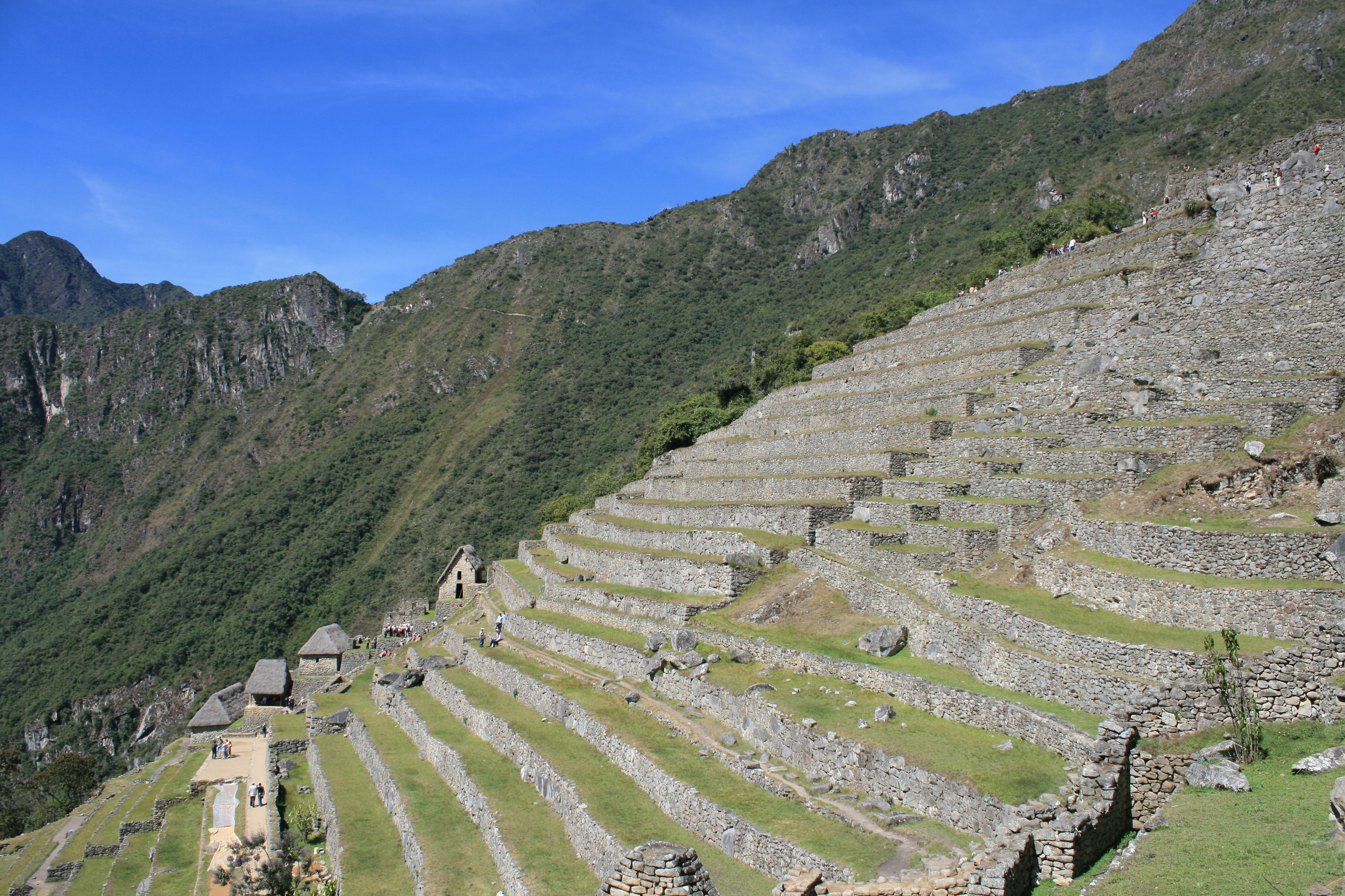 Machu Picchu